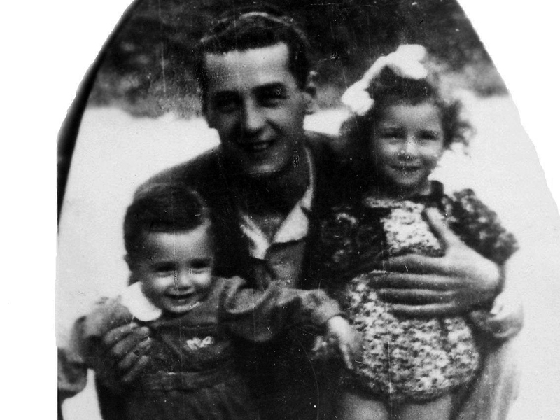 Emilio Po con i figli